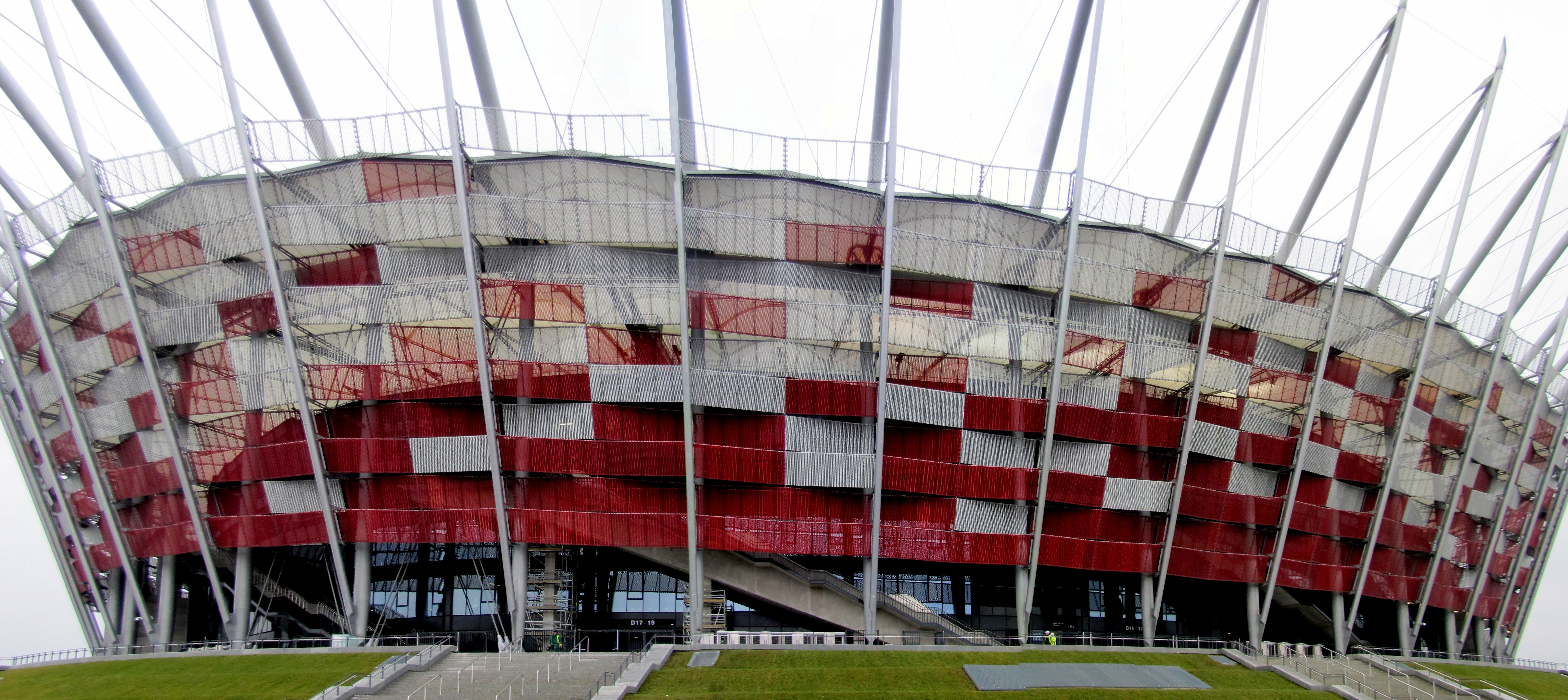 Stadion Narodowy w Warszawie